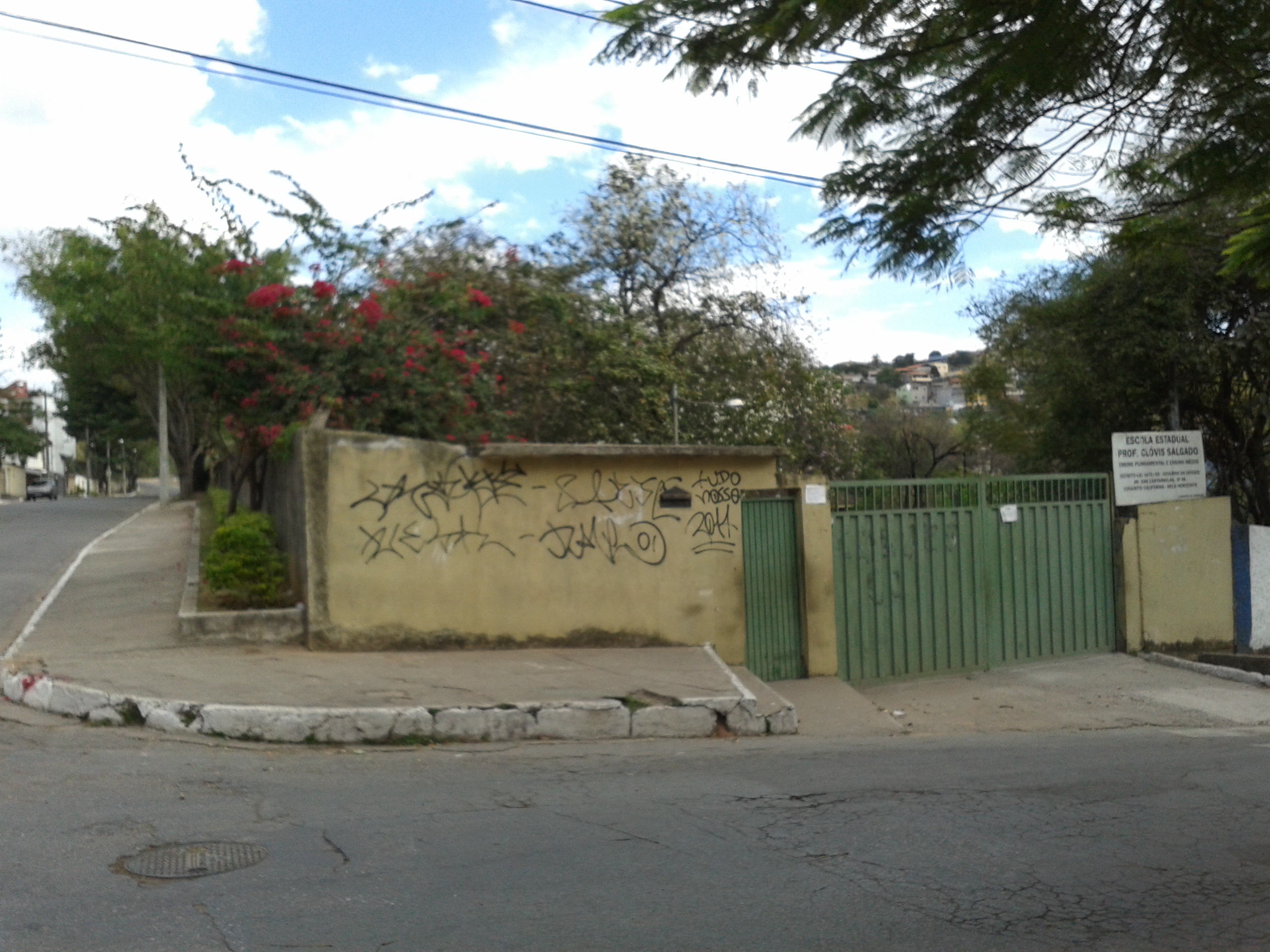 Fachada da Escola Estadual Professor Clóvis Salgado. Foto tirada na Av. das Castanholas, 80, Conjunto California I, bairro Califórnia, Belo Horizonte, MG